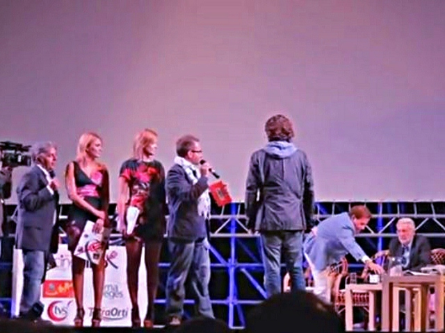 Il Festival internazionale del cinema a tema gastronomico Cinecibo che si svolge a Castellabate nella location di Marina piccola.